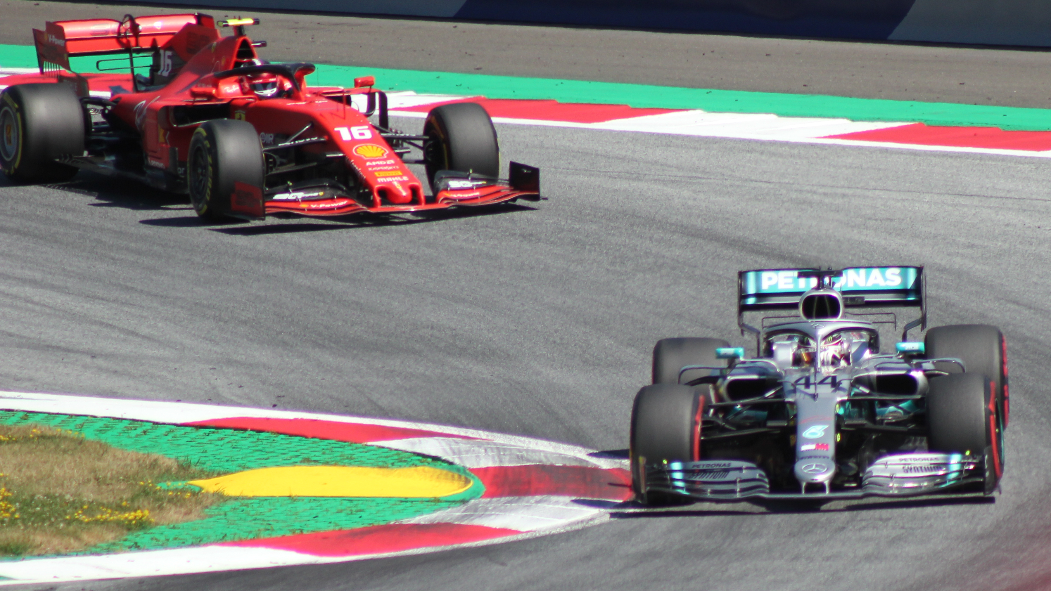 Hamilton und Leclerc beim Rennwochenende in Österreich 2019